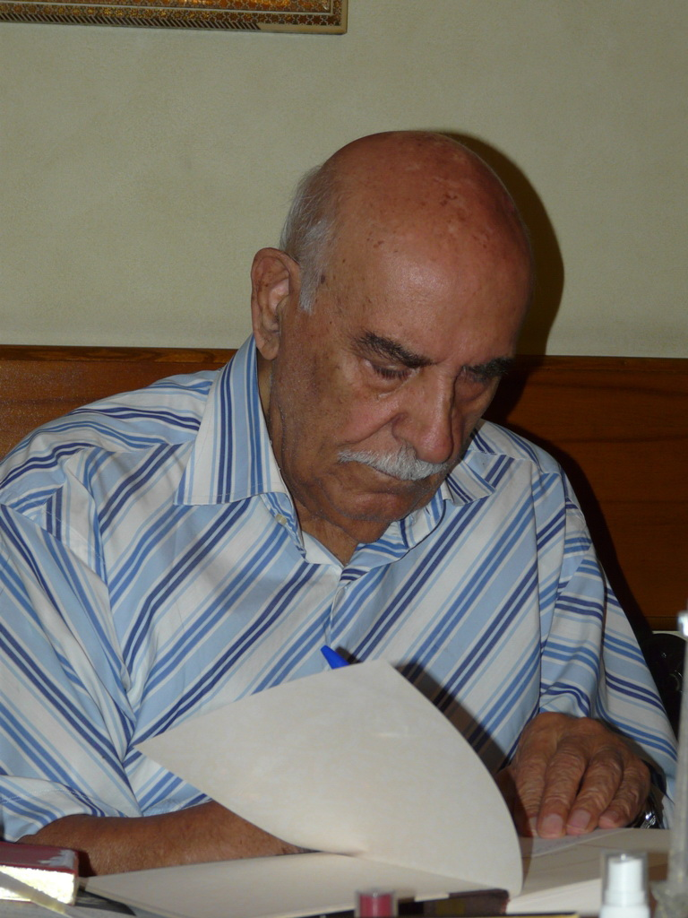 عبدالرحیم جعفری-پایه گذار انتشارات امیرکبیر